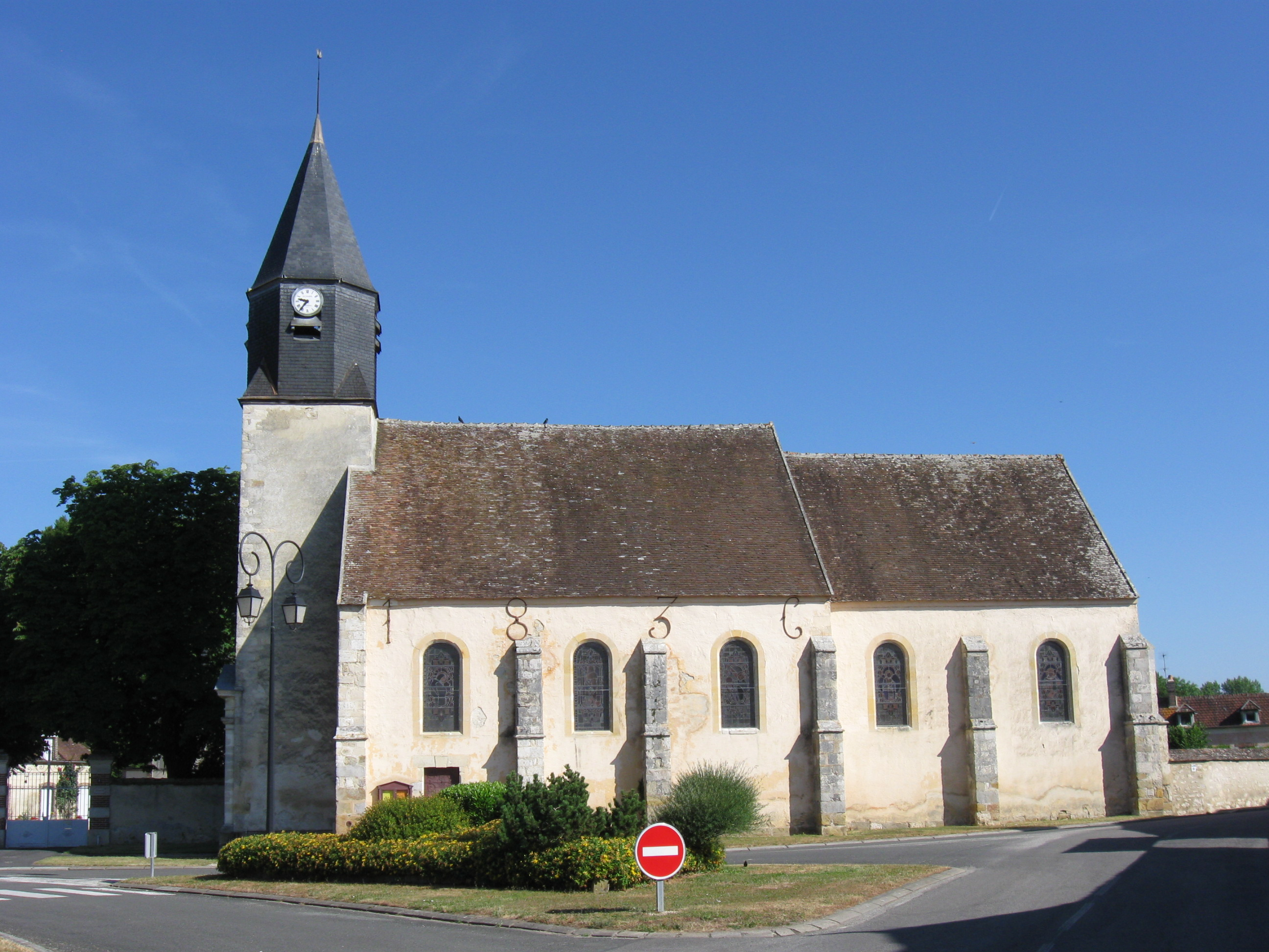 Église Saint Paterne-Saint Pavace de Saint-Sauveur-lès-Bray. (Seine-et-Marne, région Île-de-France).